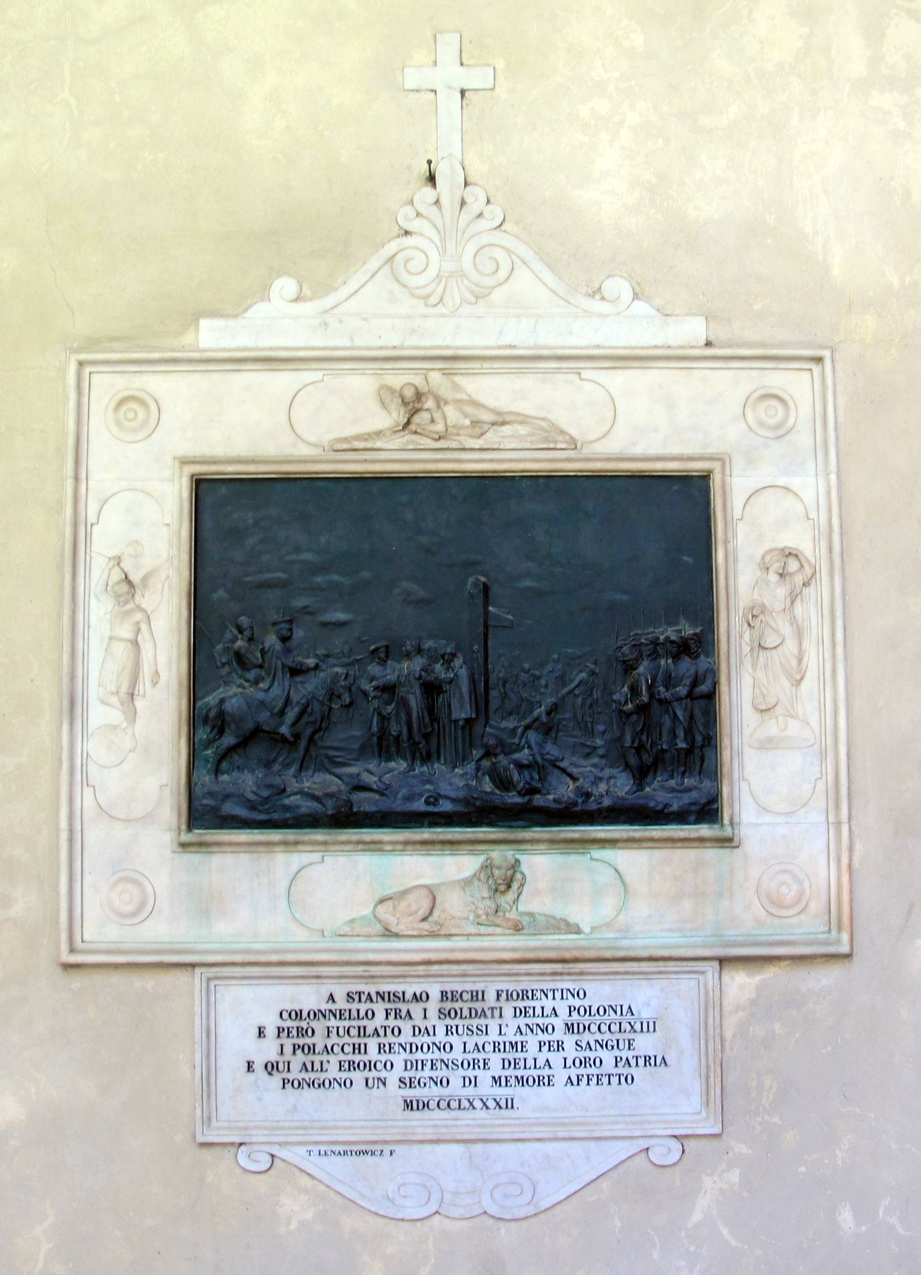 Primo chiostro, lapide e rilievo a stanislao bechi